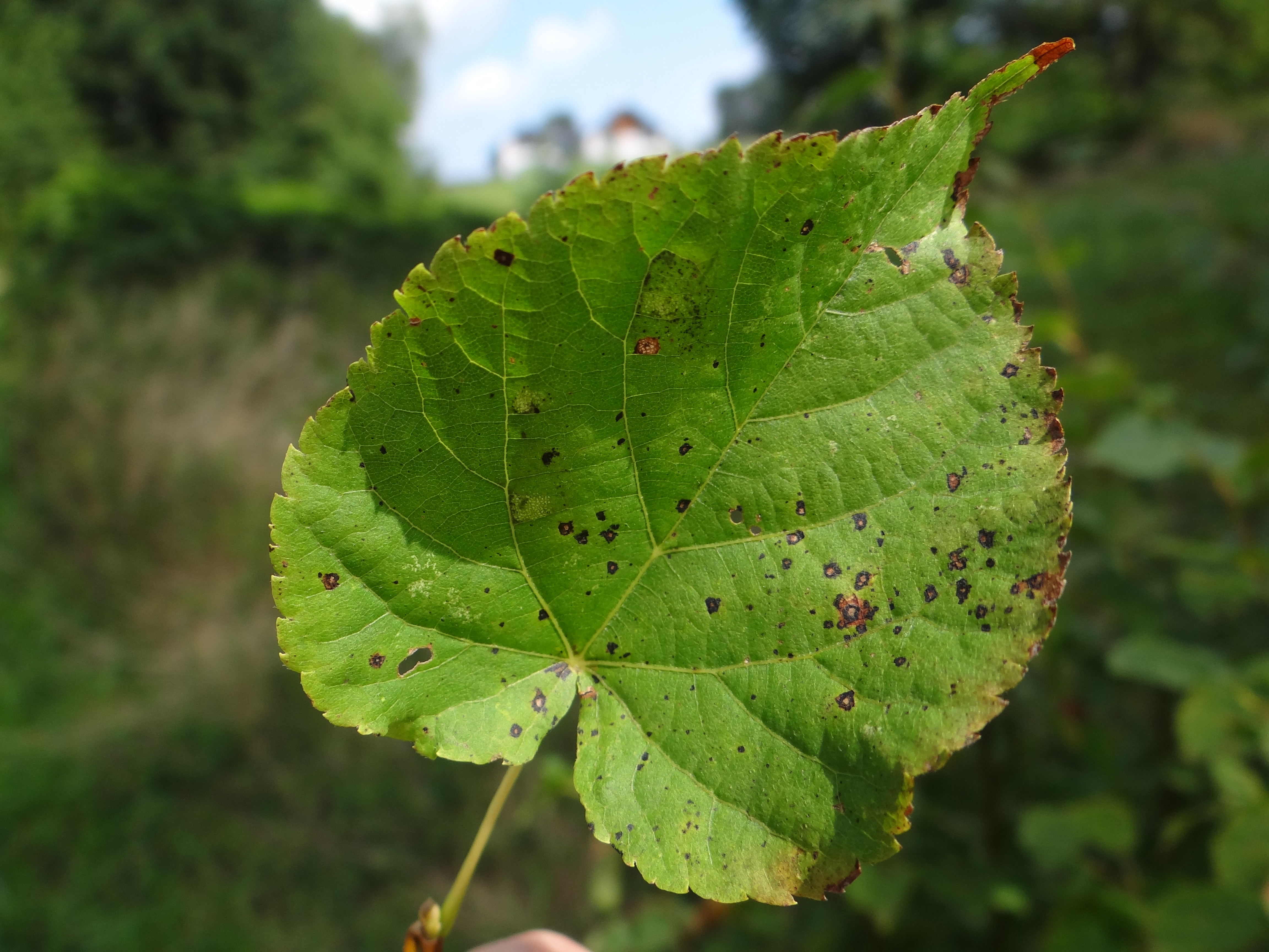 Apiognomonia errabunda on Tilia cordata